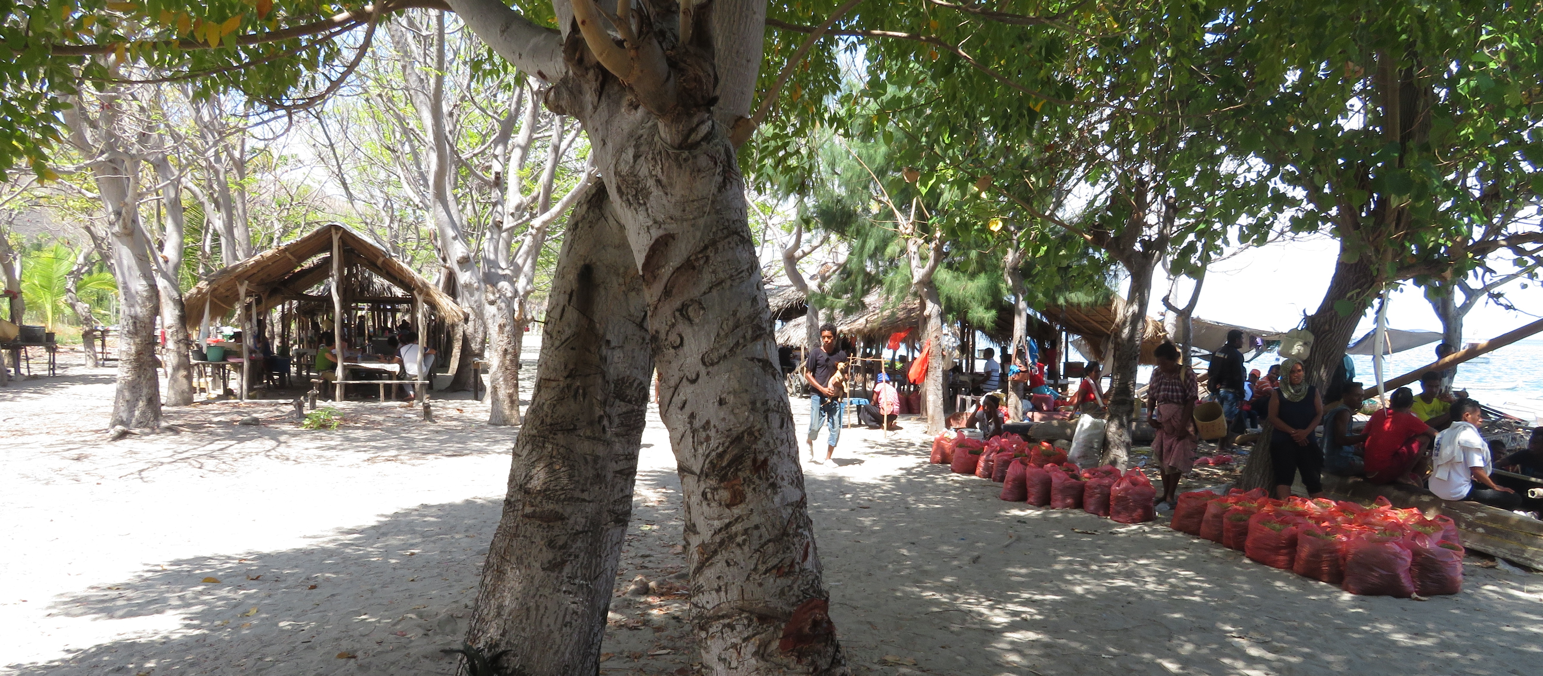 Markt am Fähranleger, Beloi, Insel Ataúro, Timor Leste